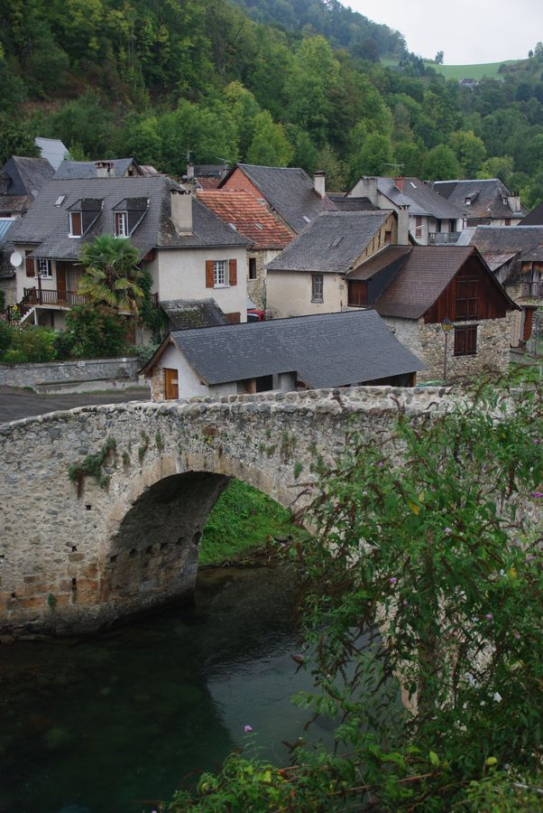 Pont du 13e s. enjambant le Lez au quartier d'Ourjout. (Inscrit, 1941) .